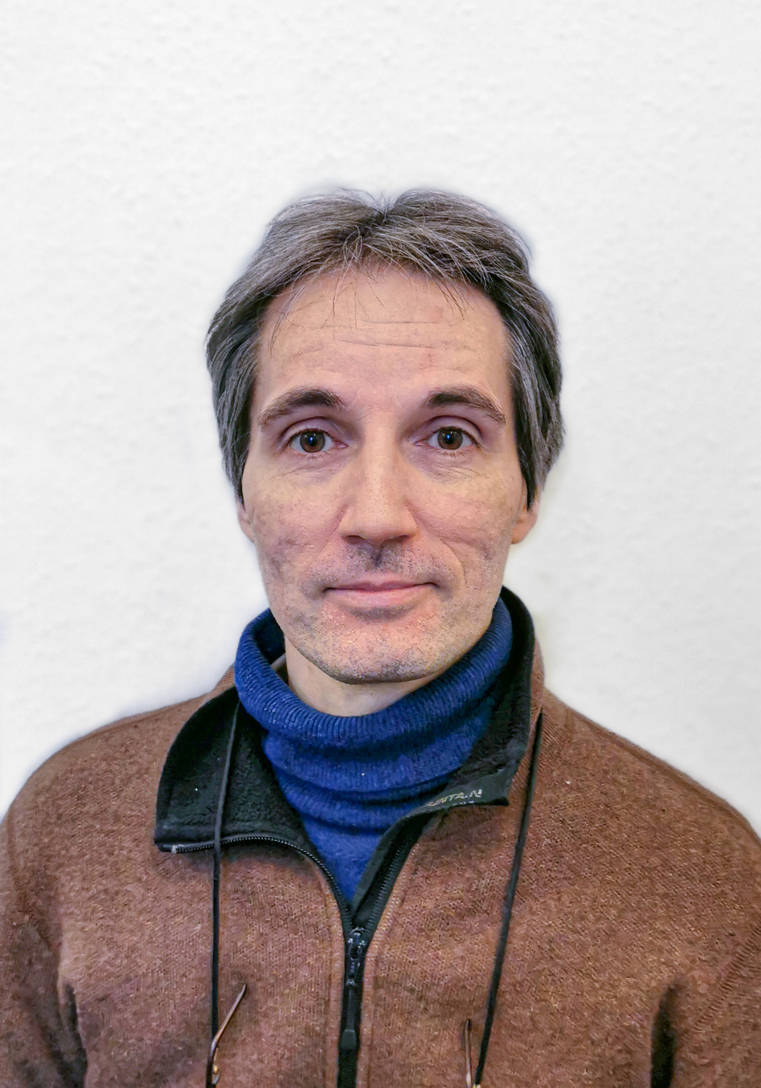 Stephan Mögle-Stadel 2019